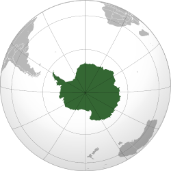 انٹارکٹیکا کا نقشہ